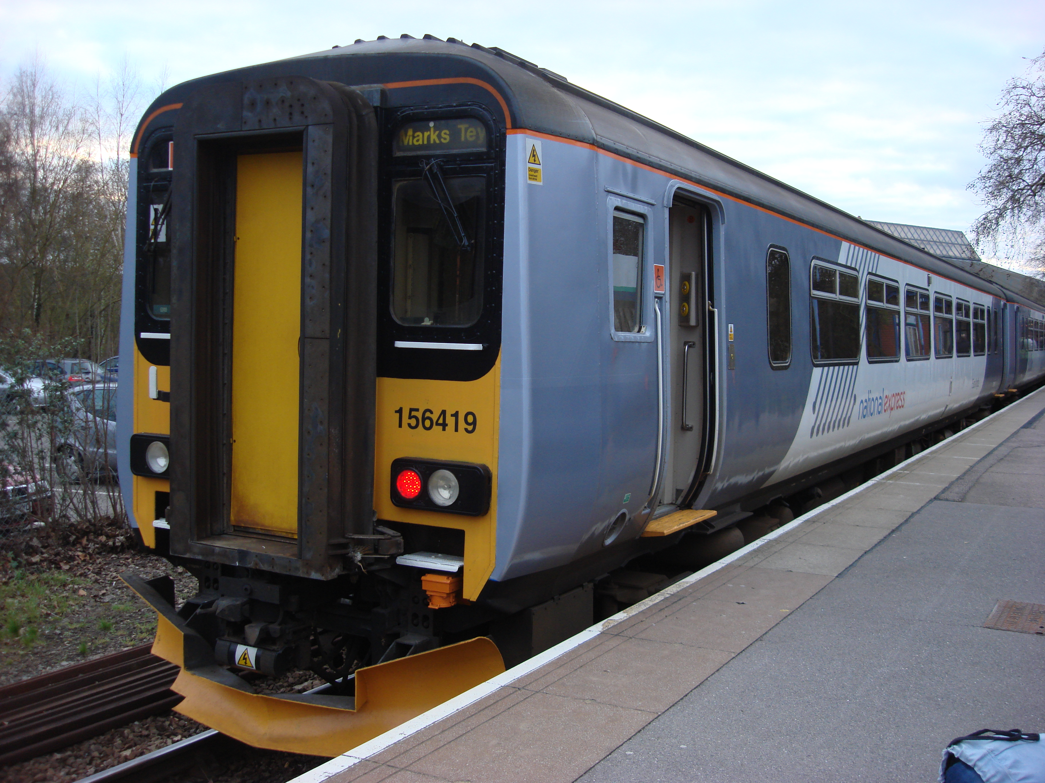 156419 at Sudbury